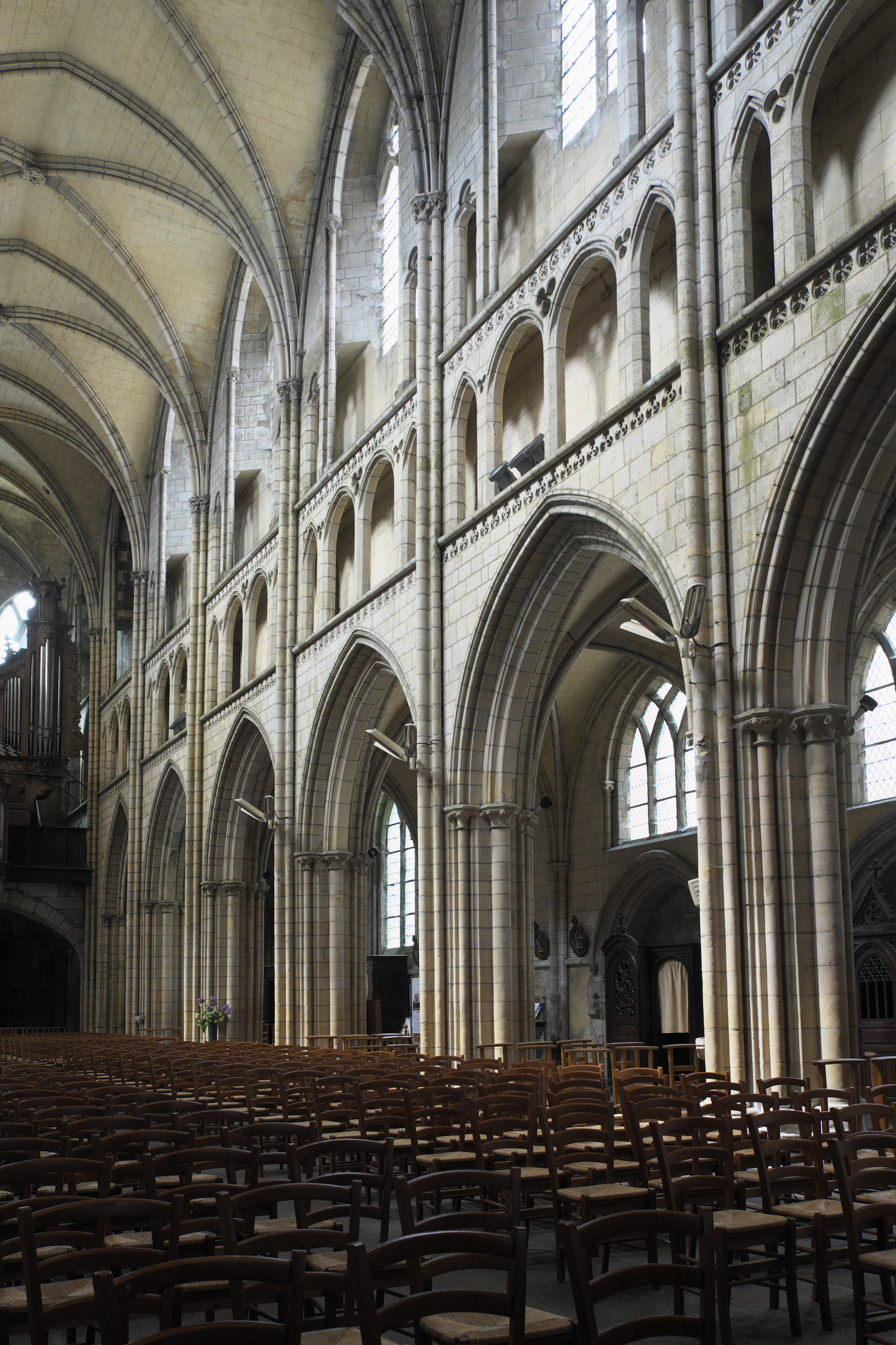 Ehemalige Kathedrale Saint-Paul-Aurélien in Saint-Pol-de-Léon im Département Finistère (Region Bretagne/Frankreich), Innenraum